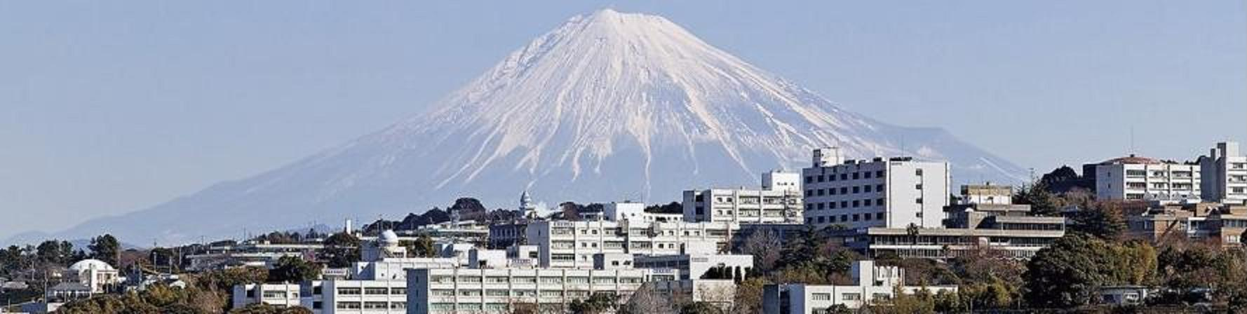 静岡大と富士山